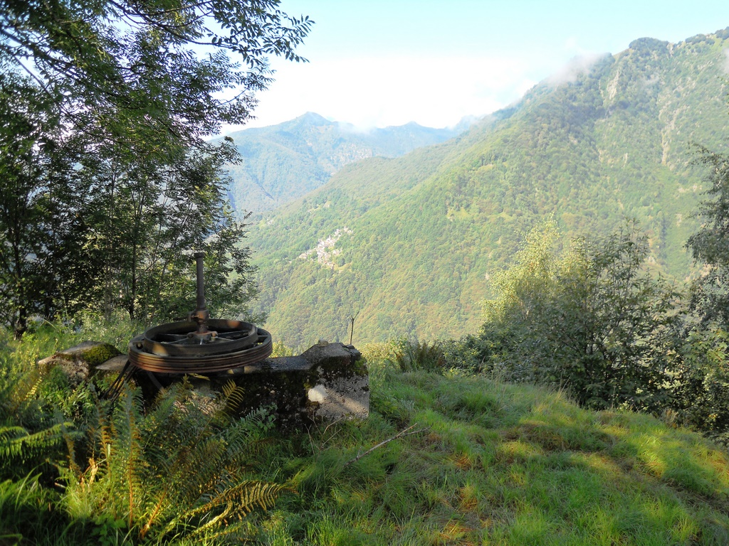 L'antica teleferica all'Ape Variola. Sullo sfondo, l'abitato di Cicogna